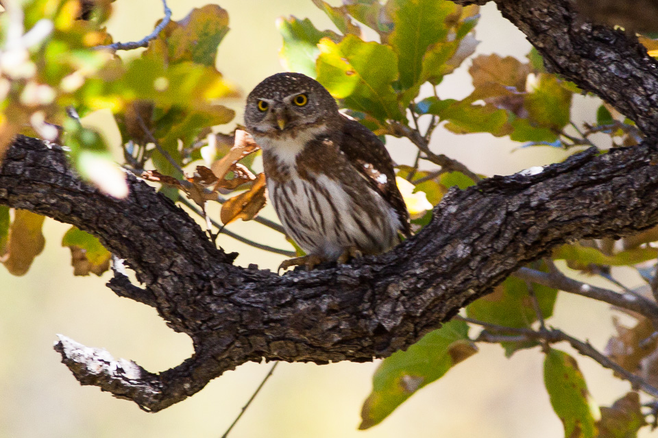 Sierra de la Laguna,Baja California